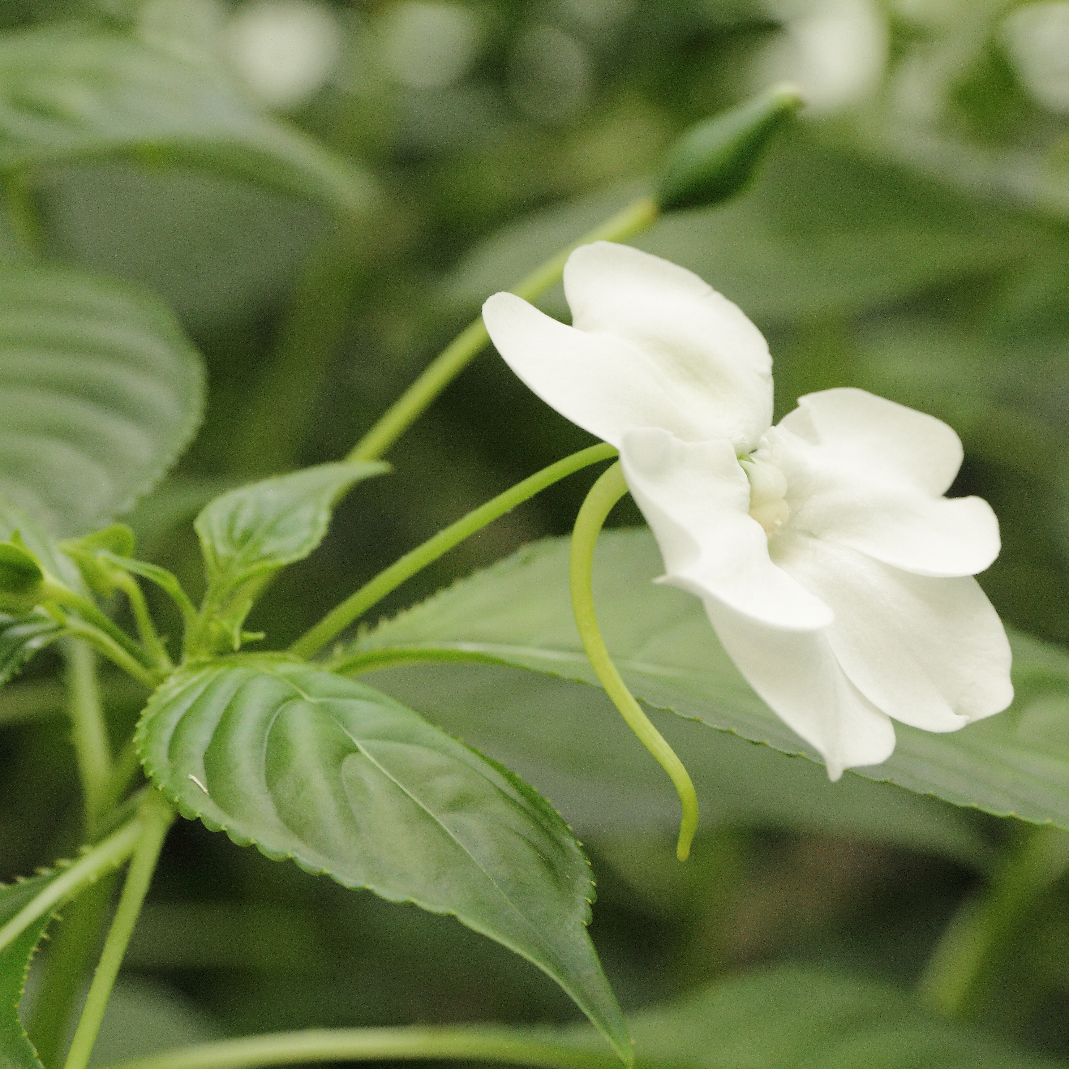 Impatiens flaccida i Bergianska trädgården.